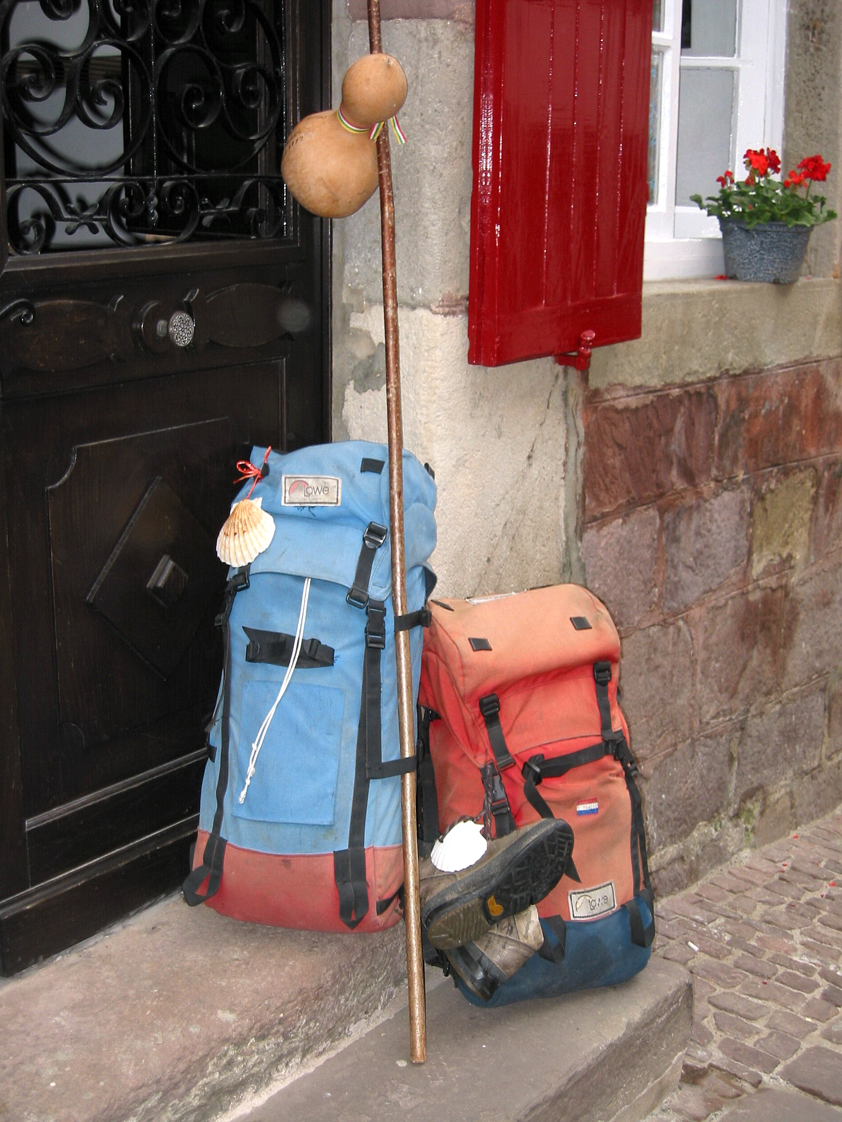 Saint-Jean-Pied-de-Port, pélerins le chemin de Saint-Jacques de Compostelle. Photo prise le 17/07/2005 par Harrieta171